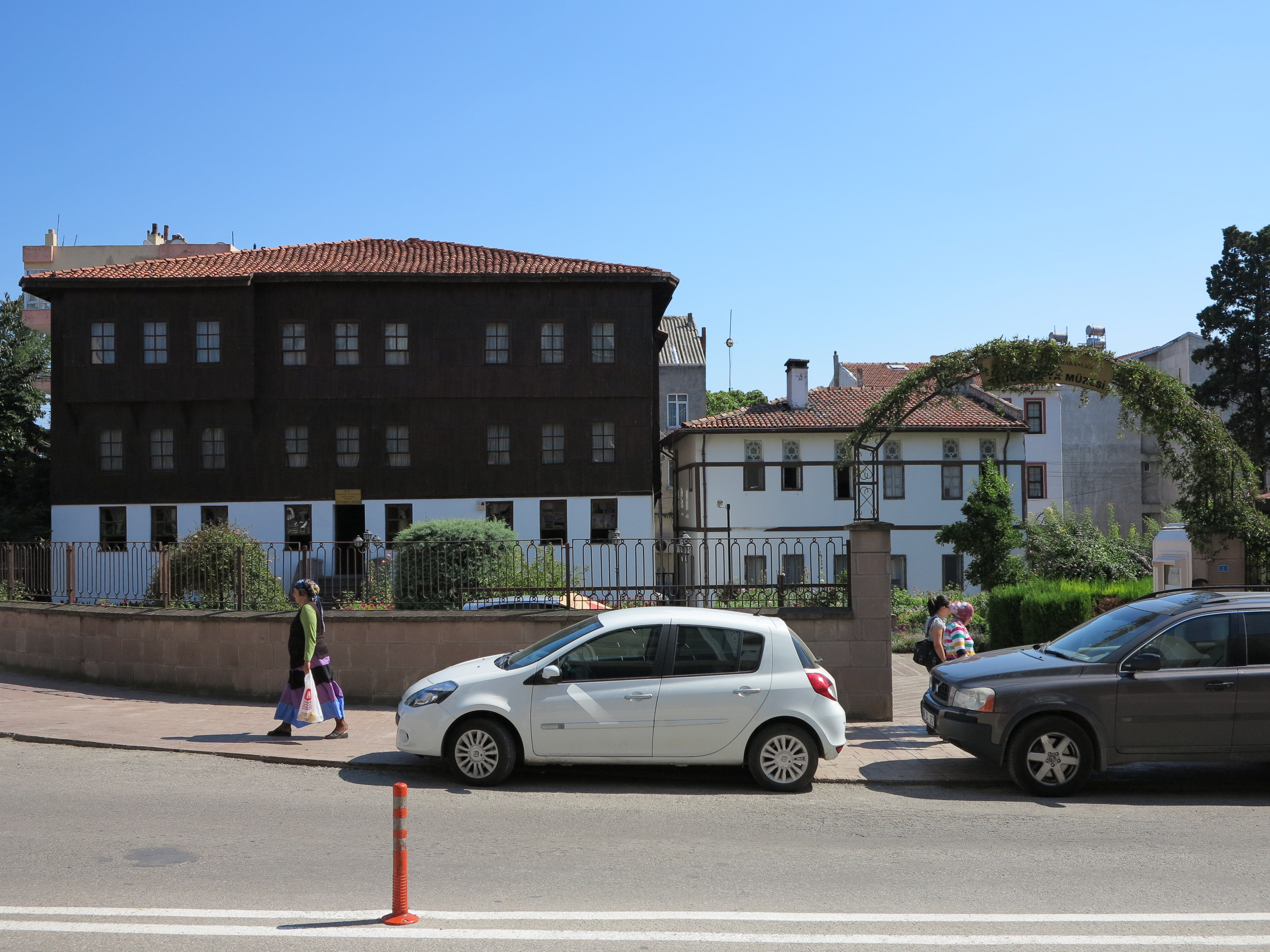 SINOP ETNOGRAFYA MUZESI